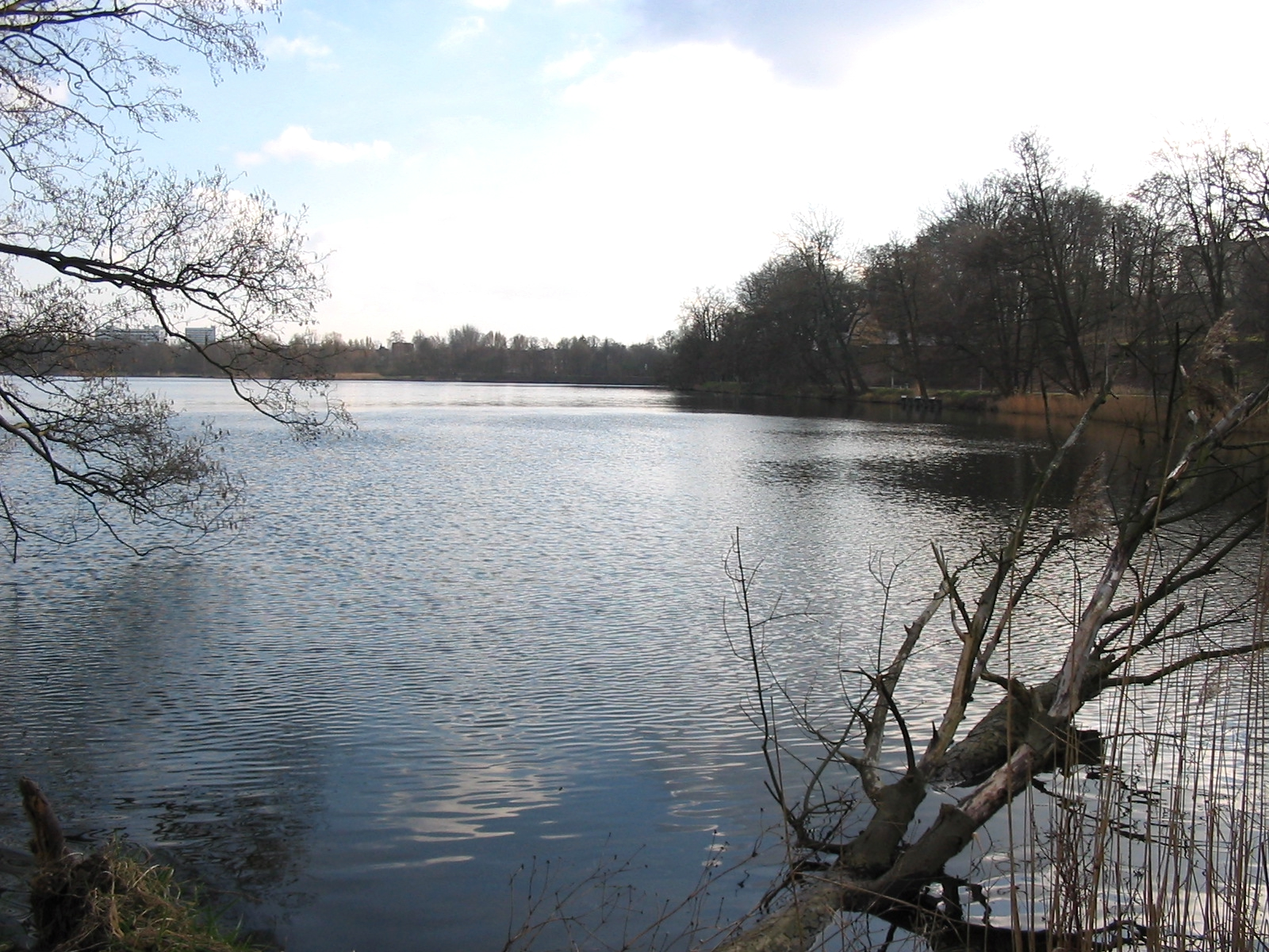 Fauler See in Schwerin, Germany